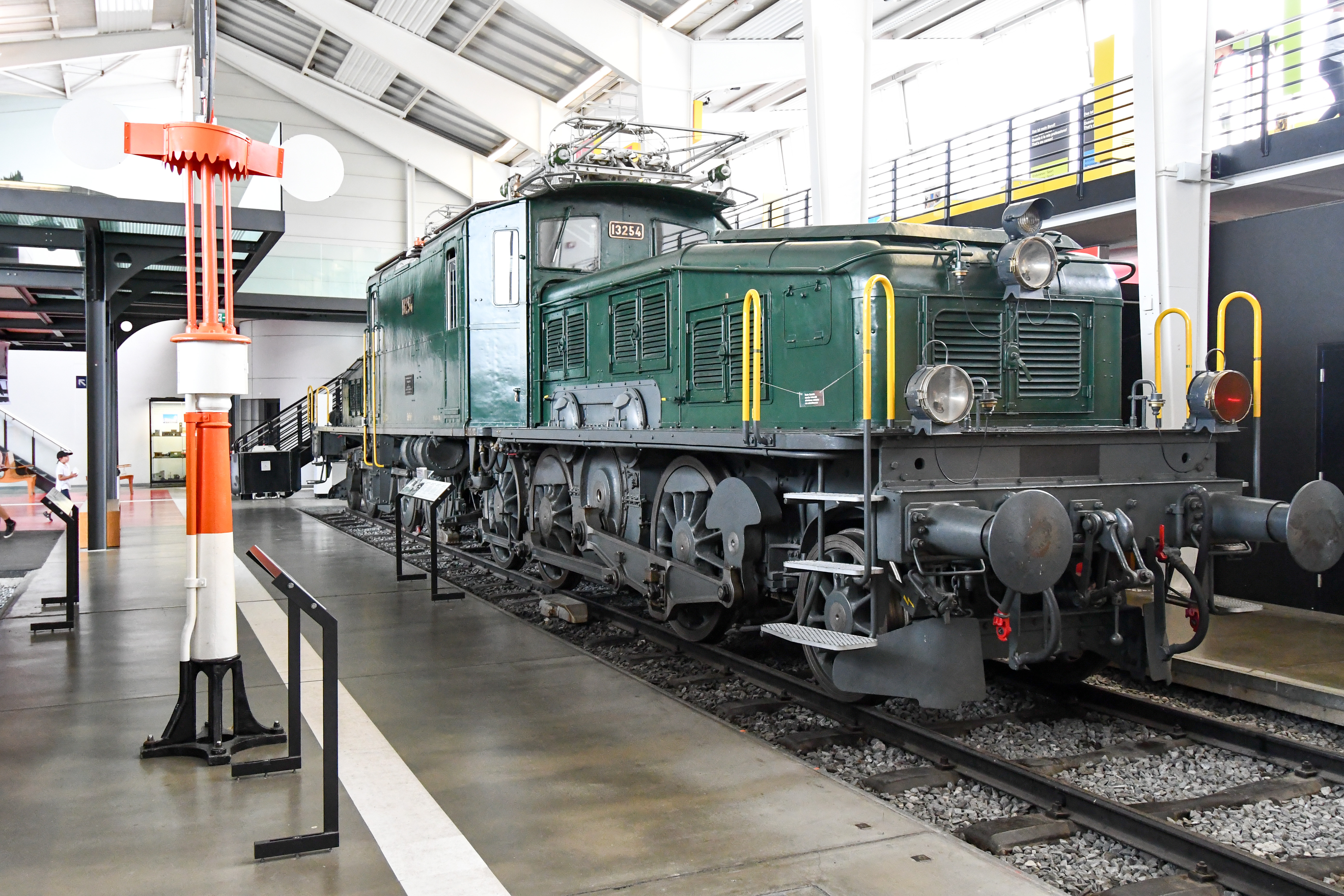 Die elektrische Güterzugslokomotive Be 6/8 II Nr. 13254 im Verkehrshaus der Schweiz in Luzern.